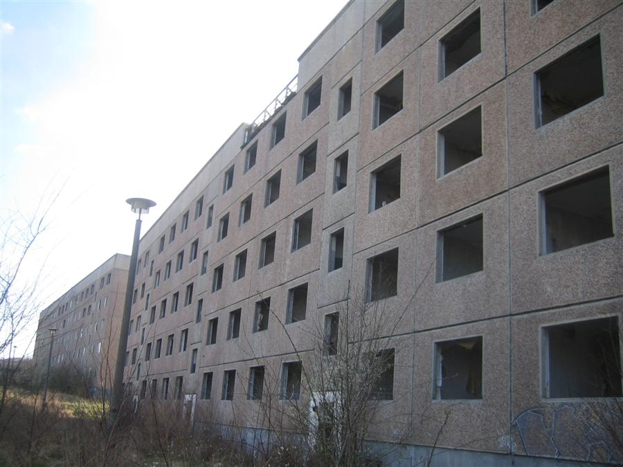 Kavallerieschule Krampnitz Plattenbau